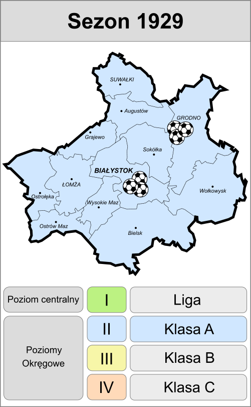 Jagiellonia w sezonie 1929 - mapa